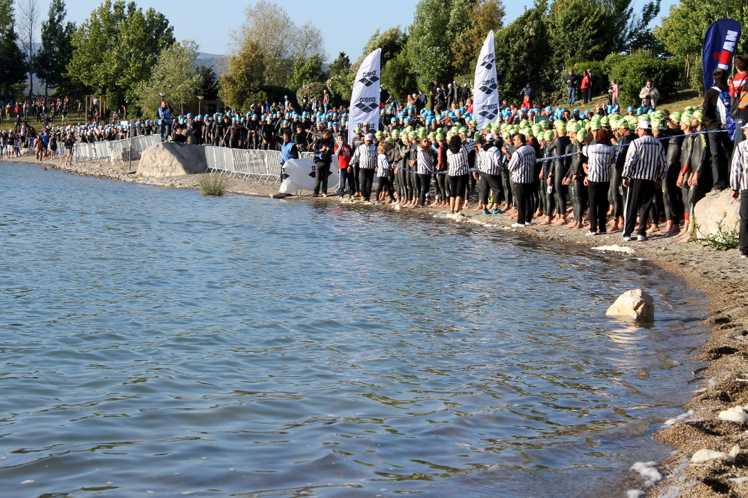 Sas de départ par vagues de l'IMPA70.3